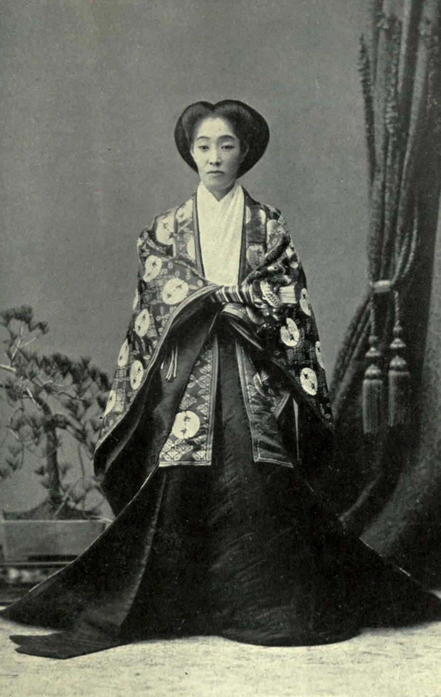 明治天皇妃の女官長